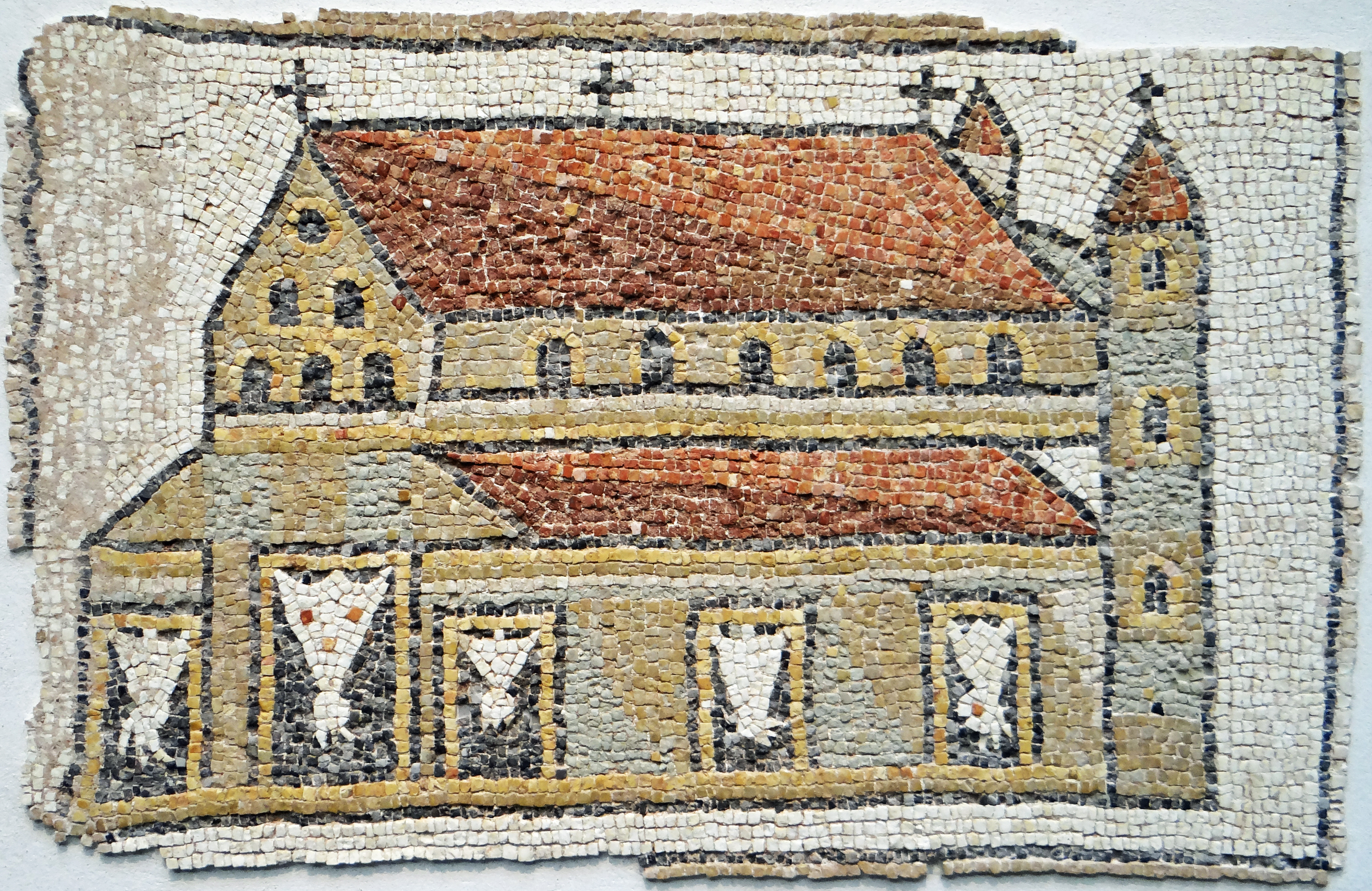 Orient méditerranéen de l'Empire romain - Basilique à tours (5ème siècle après J.-C.)